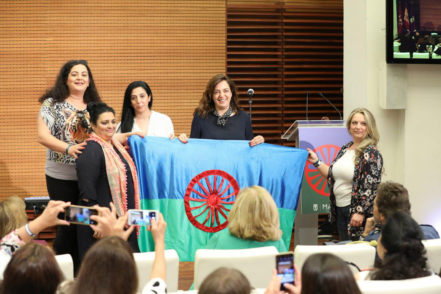 Madrid también es gitana. Con esta reivindicación las asociaciones madrileñas de esta etnia han entregado hoy, jueves 24 de mayo, a la delegada de Políticas de Género y Diversidad, Celia Mayer, su bandera. Y lo han hecho para celebrar el Día de las gitanas y gitanos de Madrid, cuya población representa el uno por ciento de los madrileños.